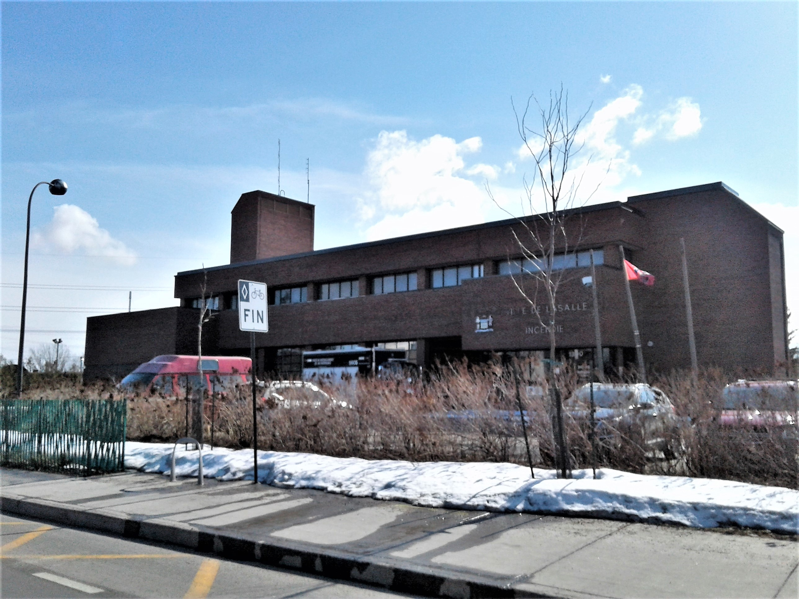 Caserne de pompiers numéro 65, 1300, avenue Dollard, LaSalle, Montréal « Cette caserne fut construite en 1978 pour le service des incendies de LaSalle. Plus tard elle deviendra le quartier général et identifiée comme caserne 1 de la Régie de la sécurité publique de LaSalle – Verdun. À la suite de la fusion des services d’incendie le 1er janvier 2002, elle devient la première caserne 65. »